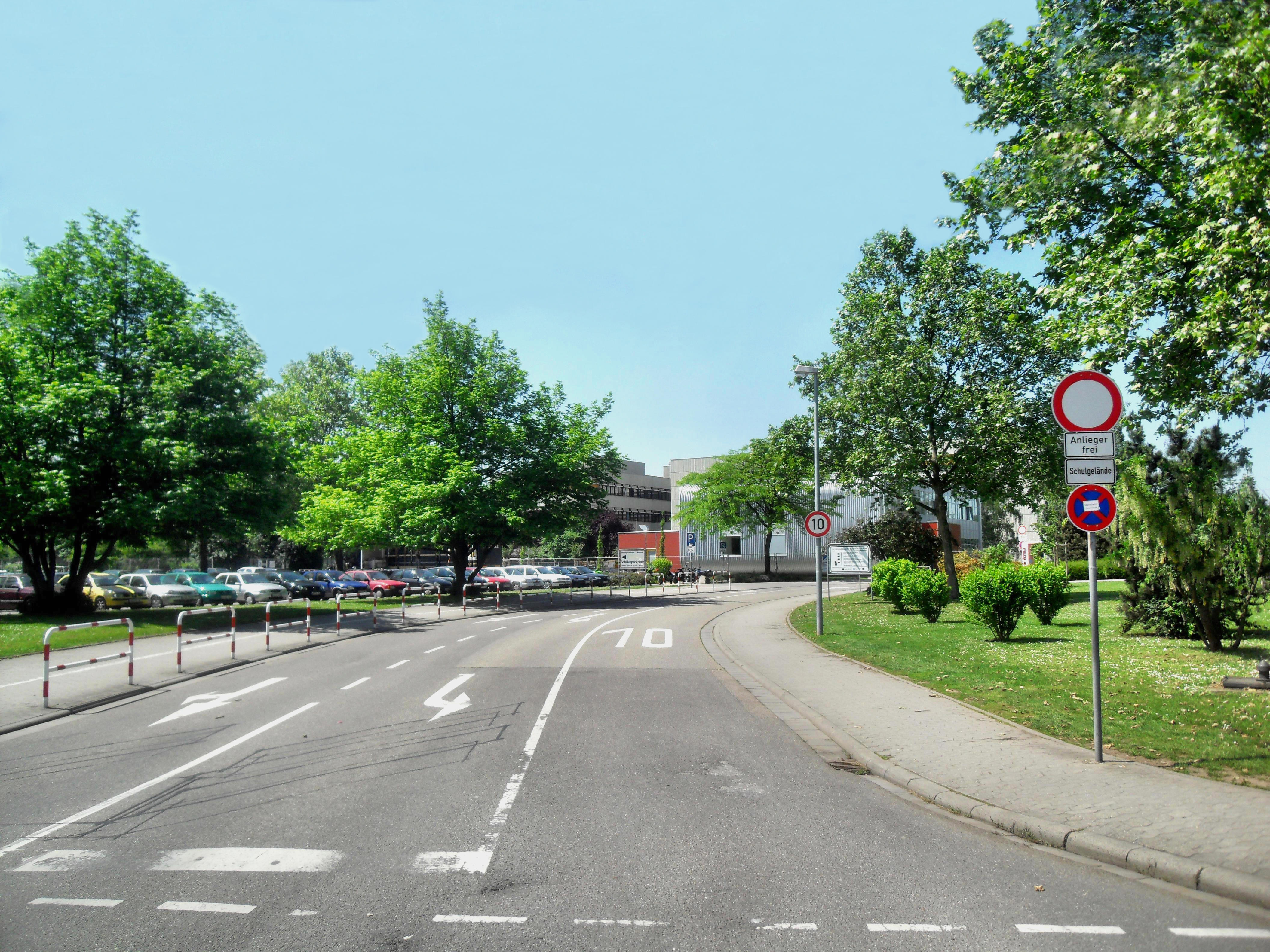 Die Haupteinfahrt zum Bildungszentrum in Worms in Rheinland-Pfalz (Deutschland)